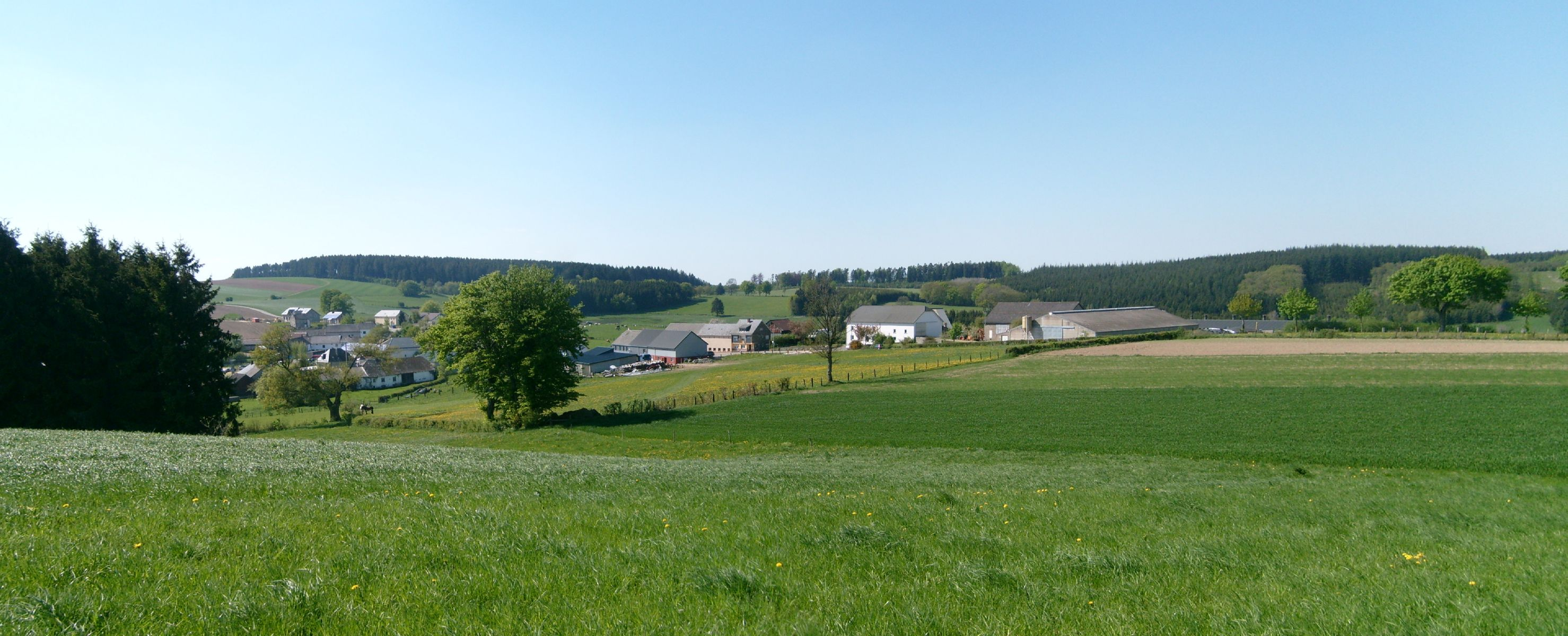 Vue vun Osten op Beeler - 11. Mee 2008. Kategorie:Gemeng Wäiswampech